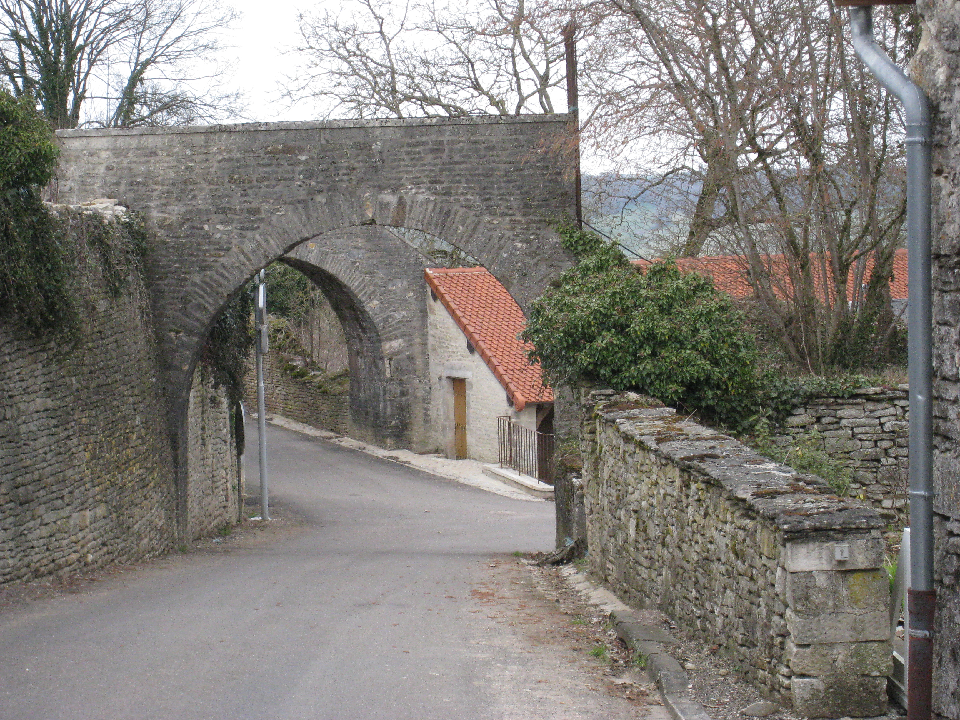 Rue du village surplombée par les ponts qui permettent de traverser la route depuis le château.